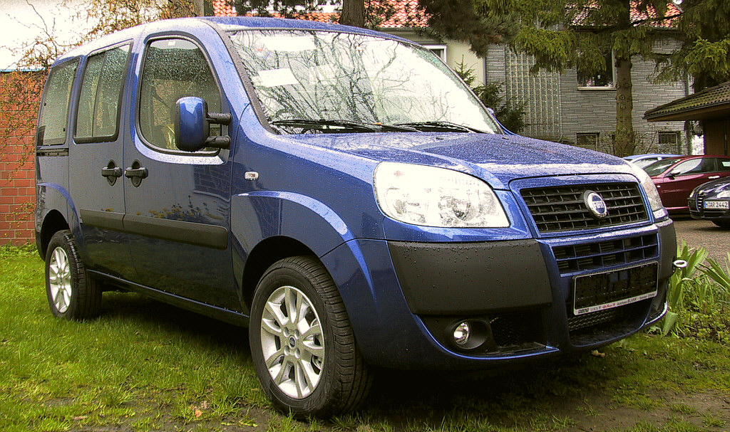 Fiat Doblo, Modell 2006, Ausstattungsvariate Dynamic.